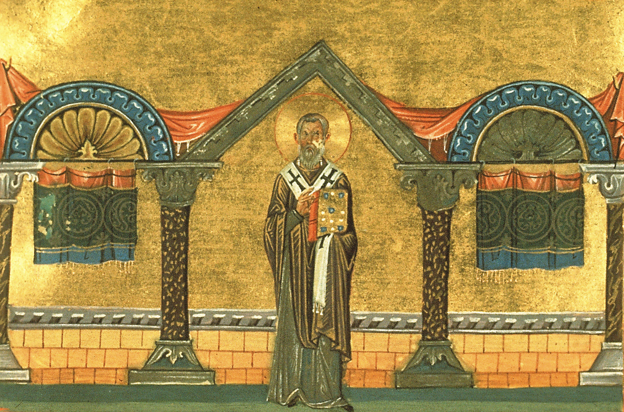 Евлогий (Патриарх Александрийский) Константинополь. 985 г. Миниатюра Минология Василия II. Ватиканская библиотека. Рим.